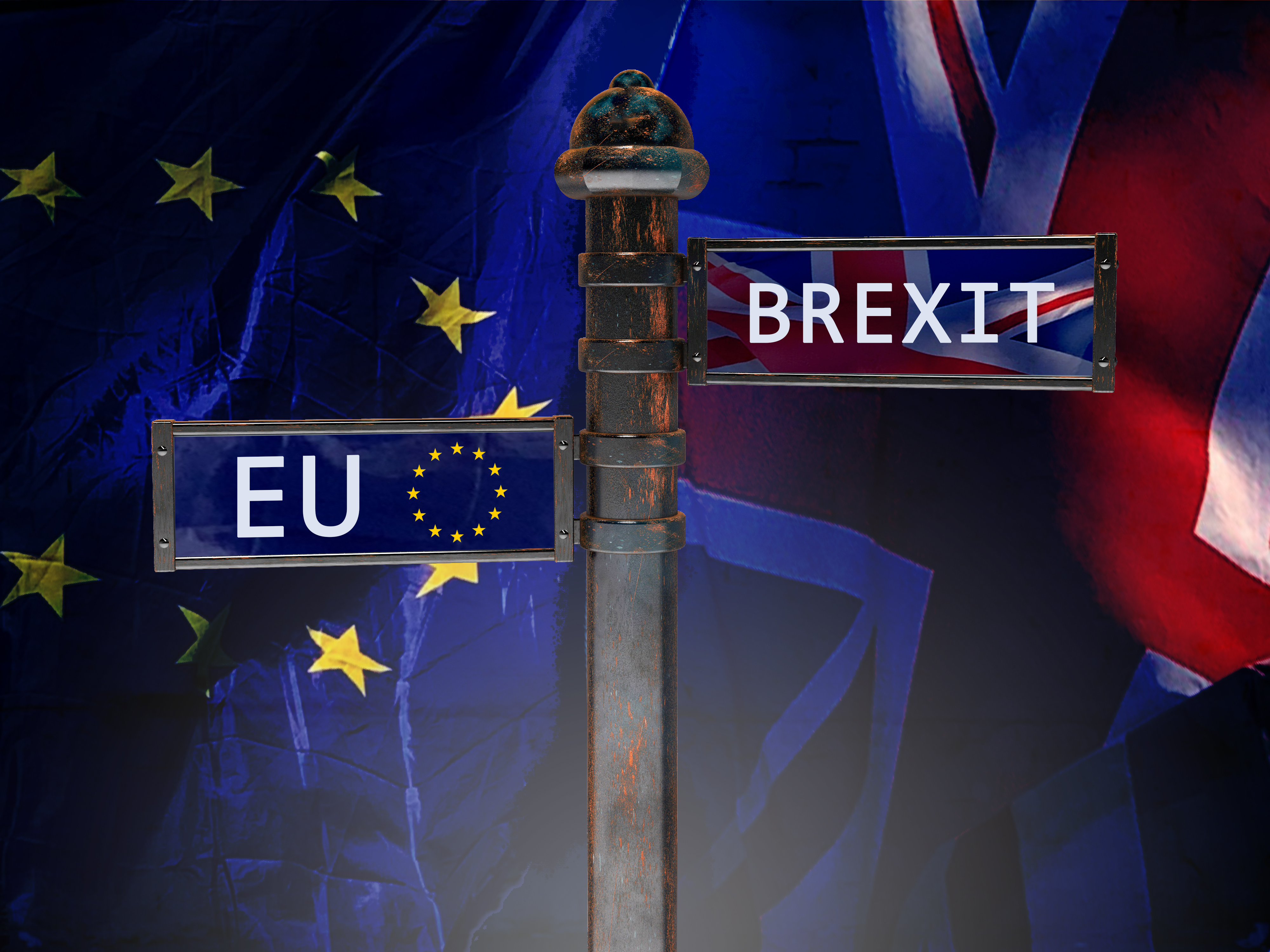 Brexit auf Wegweiser - Scharf